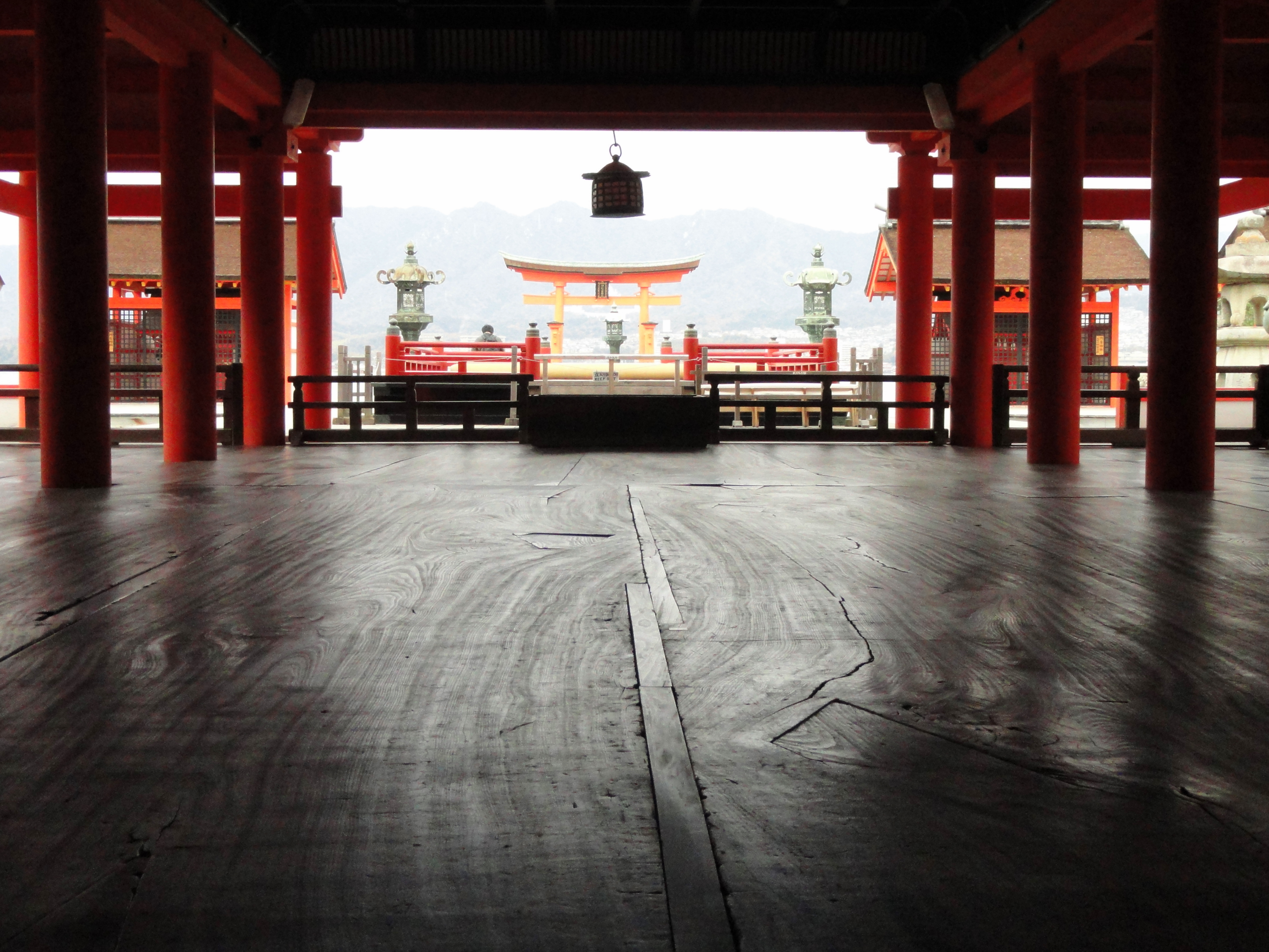 Itsukushima-jinja Shinto Shrine, Miyajima, Japan.